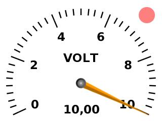 Skalenanzeiger auf TFT-Basis